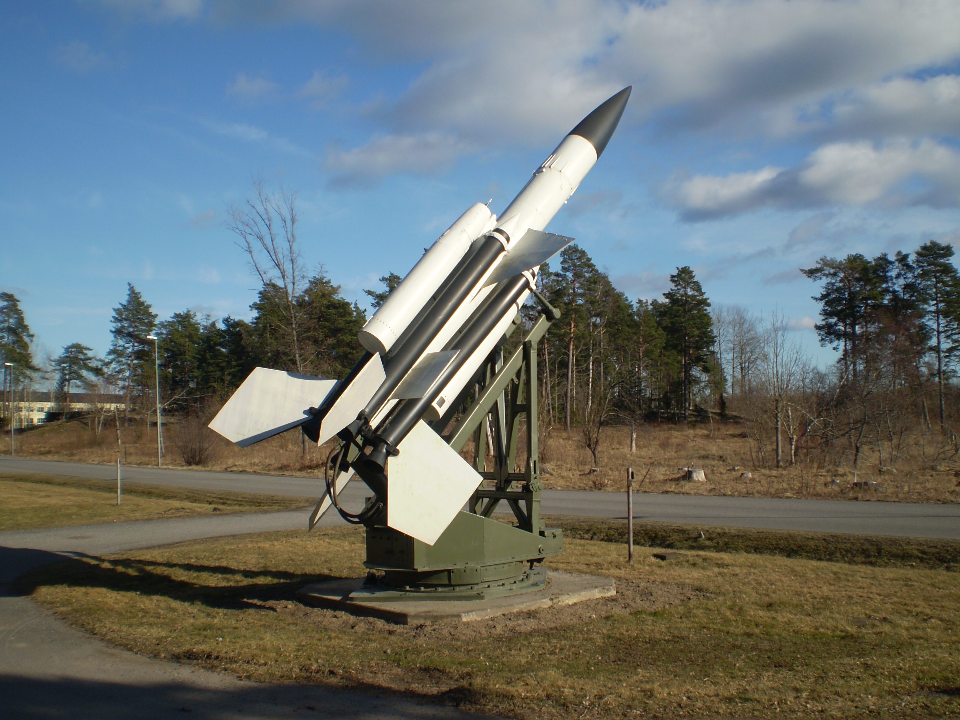 Robotsystem 68 eller Bristol Bloodhound vid Norrtälje luftvärnsmuseum i Norrtälje.